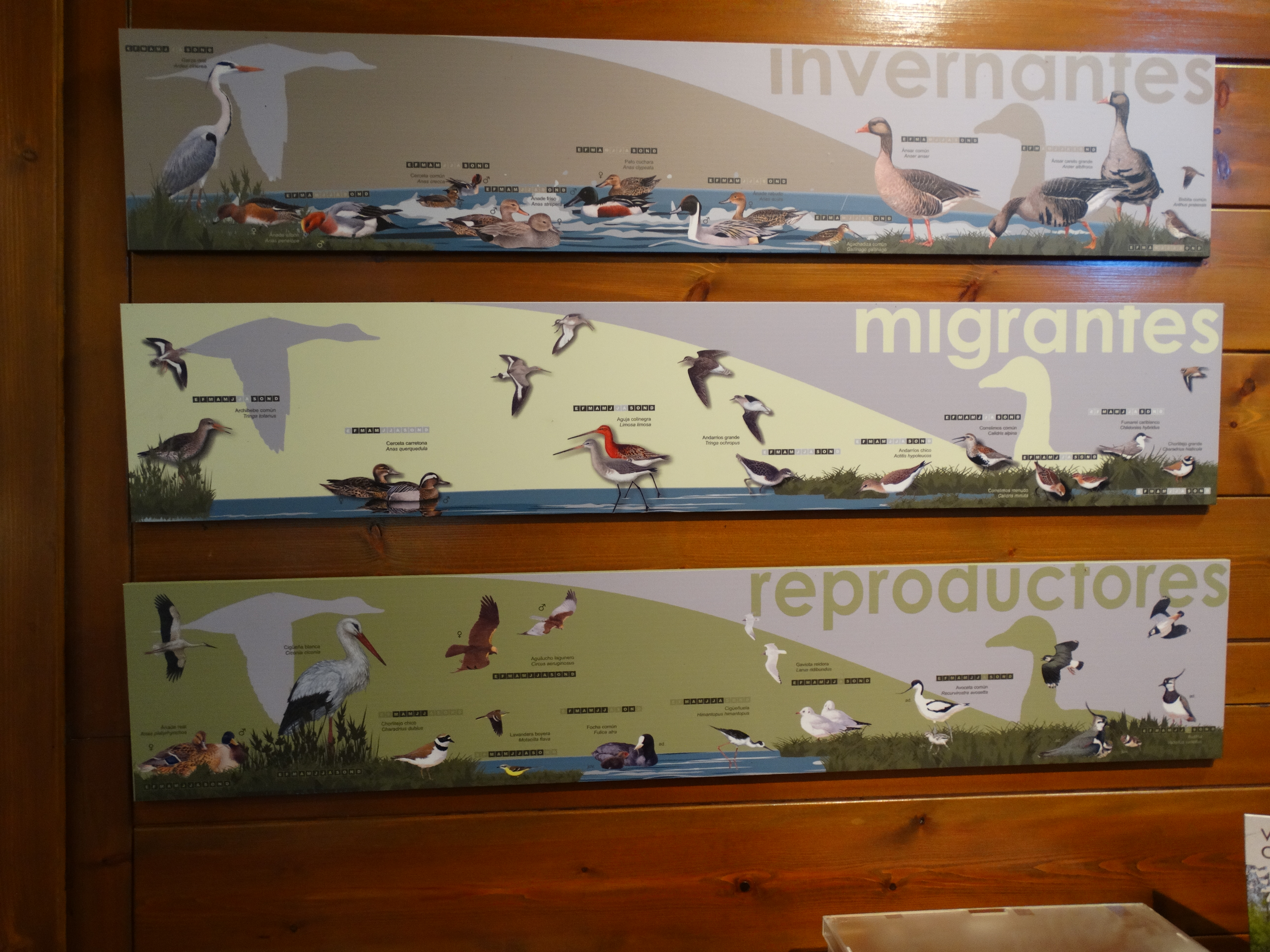 Boada de Campos, provincia de Palencia, Comunidad Autónoma de Castilla y León, España. Museo dedicado a la Laguna de Boada. El edificio fue un antiguo pósito o panera.